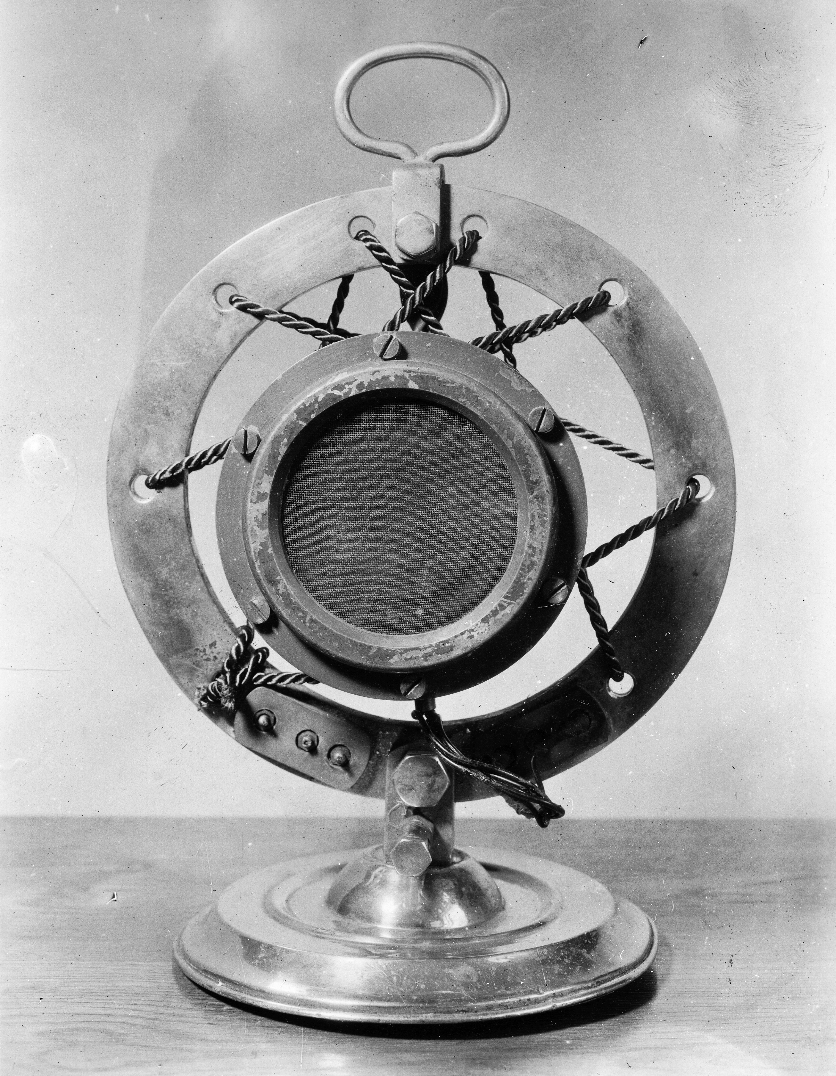 Eredeti mikrofon az 1920-as évek végéről, a csehszlovák rádió kezdeti idejéből. Title: Eredeti mikrofon az 1920-as évek végéről, a csehszlovák rádió kezdeti idejéből.